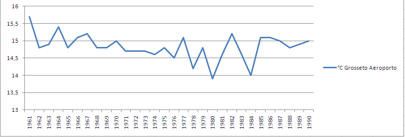 Stazione meteorologica di Grosseto Aeroporto: andamento della temperatura media annua dal 1961 al 1990